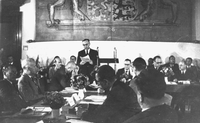 Zentralbild Zum ersten Male nach dem Zusammenbruch hatten sich die Ministerpräsidenten und Vertreter der deutschen Länder, mit Ausnahme der 5 Ministerpräsidenten der sowjetischen Besatzungszone, gemeinsam an einen Konferenztisch gesetzt, um die für die deutschen Zukunft wirtschaftlichen und politischen Fragen zu erörtern. Die Konferenz fand am 6. und 7. Juni 1947 unter Vorsitz des bayrischen Ministerpräsidenten Dr. Ehard in München statt. UBz: den bayrischen Ministerpräsidenten während seiner Ansprache. Linke Seite v. l: Dr. Hermann Wandersleb (Nordrhein-Westfalen) - Minister Lübke (Nordrhein-Westfalen) Dr. Amelunxen (geschäftsführender Ministerpräsident von Nordrhein-Westfalen) Rechte Seite: Wirtschaftsminister Dr. Haberer und Ministerpräsident Dr. Boden (beide Rheinland-Pfalz). 596-47